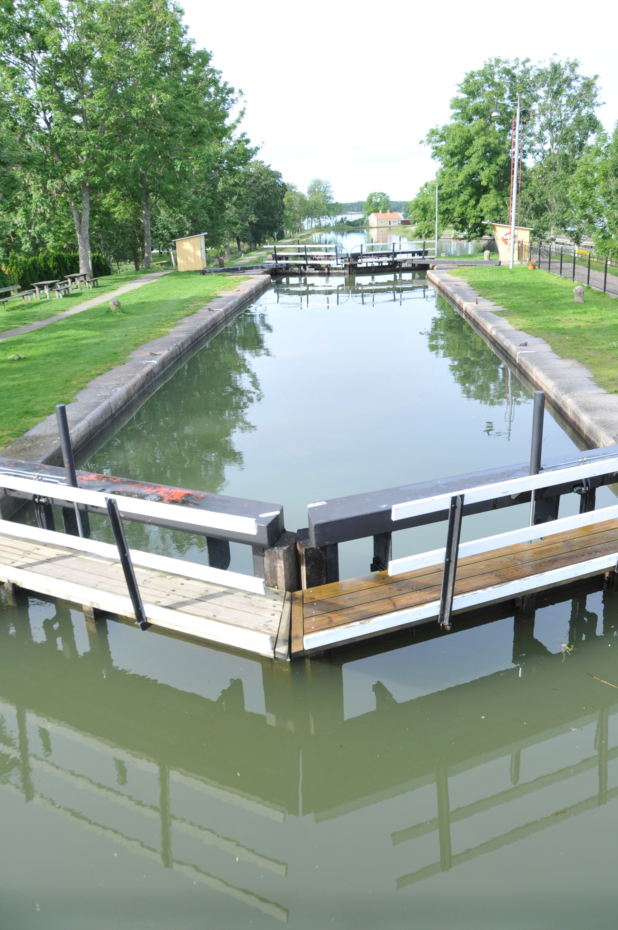 Schleuse des Götakanals bei Sjötorp